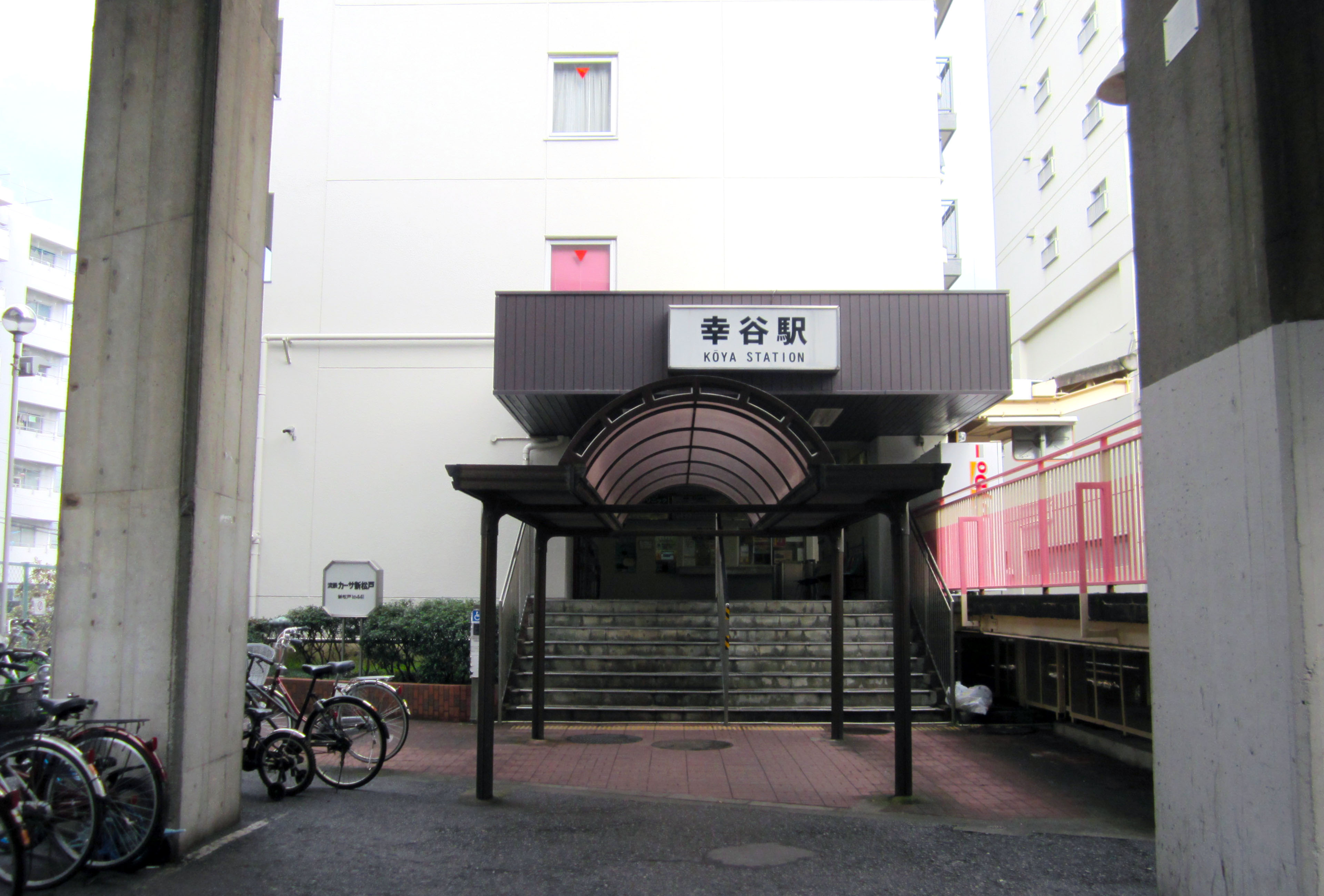 幸谷駅前にて撮影